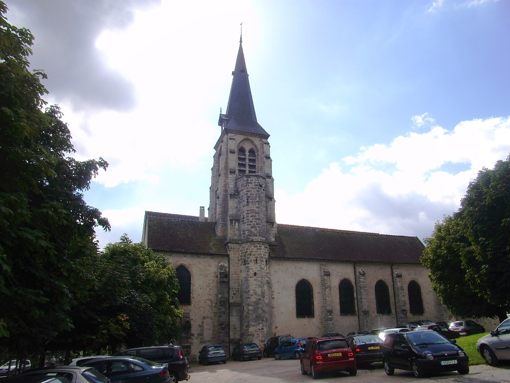 Eglise Saint-Martin de Palaiseau